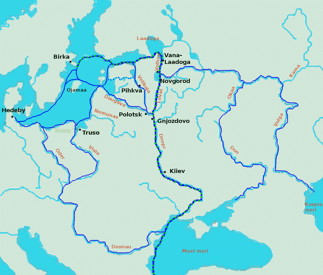 Kaubateed varjaagide juurest kreeklasteni / Idatee / Austrvegr. Allikad: *Marika Mägi (2011). "Viking Age and early medieval Eastern Baltic between the West and the East"; *Mauri Kiudsoo (2016). "Viikingiaja aarded Eestist: Idateest, rauast ja hõbedast."